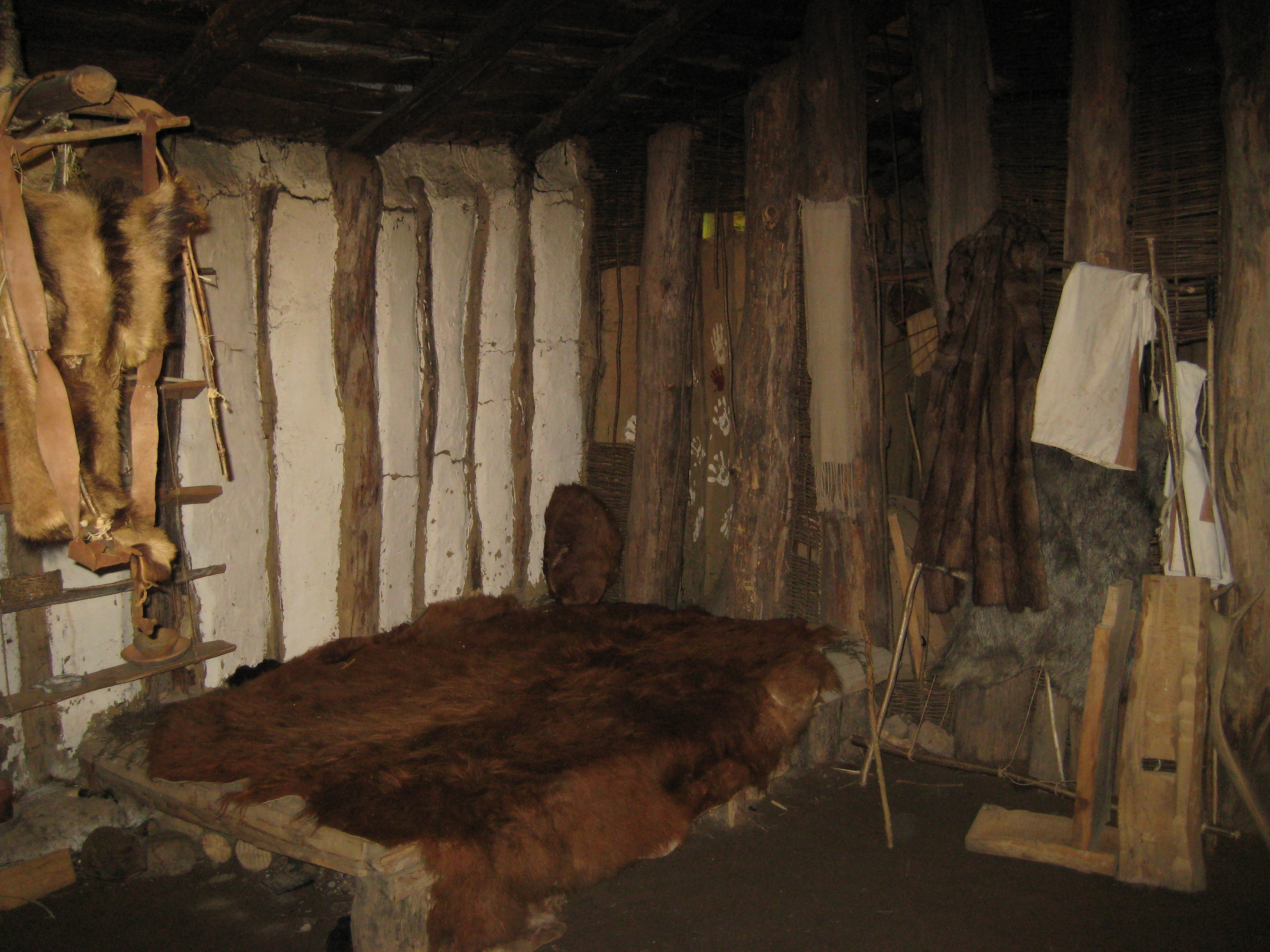 Fotos aus dem Naturerlebnisraum Archäologisch-Ökologisches Zentrum Albersdorf Nachbildung im Inneren eines Gebäudes